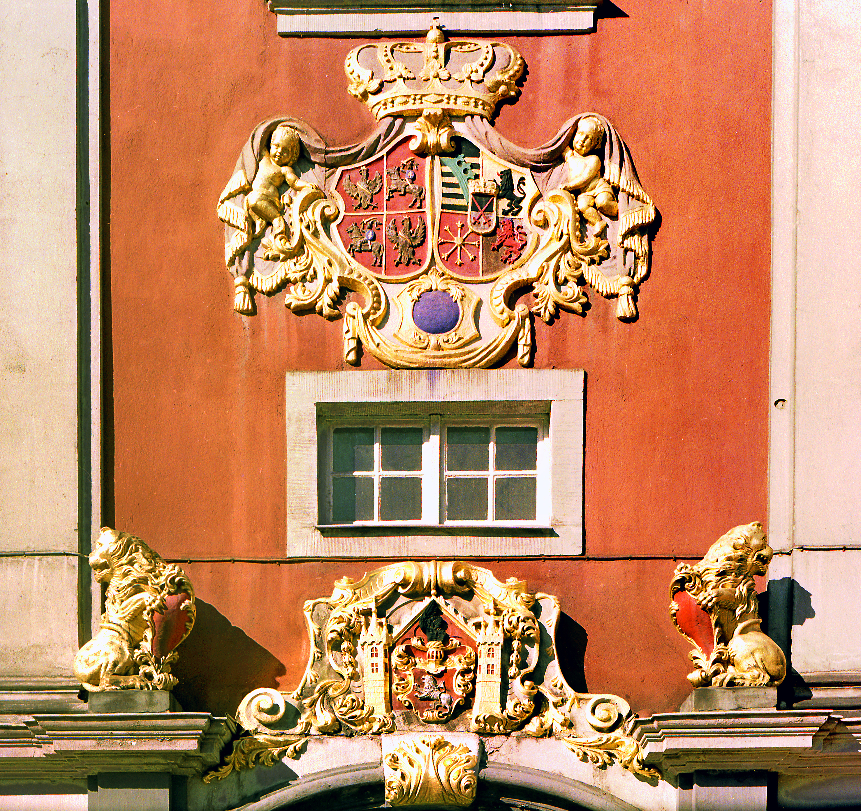 10.04.1988 8700 [02708] Löbau, Platz der Befreiung [Altmarkt]: Das barocke Rathaus (Anf. 14. Jh.). Über dem Portal das Königliche sächsisch-polnische Doppelwappen mit dem Monogramm AR für AUGUSTUS REX (König August). Darunter das Stadtwappen von Löbau. Im Mittelpunkt der böhmische Löwe im Schild. [R19880410C009.TIF]19880410730NR.JPG(c)Blobelt